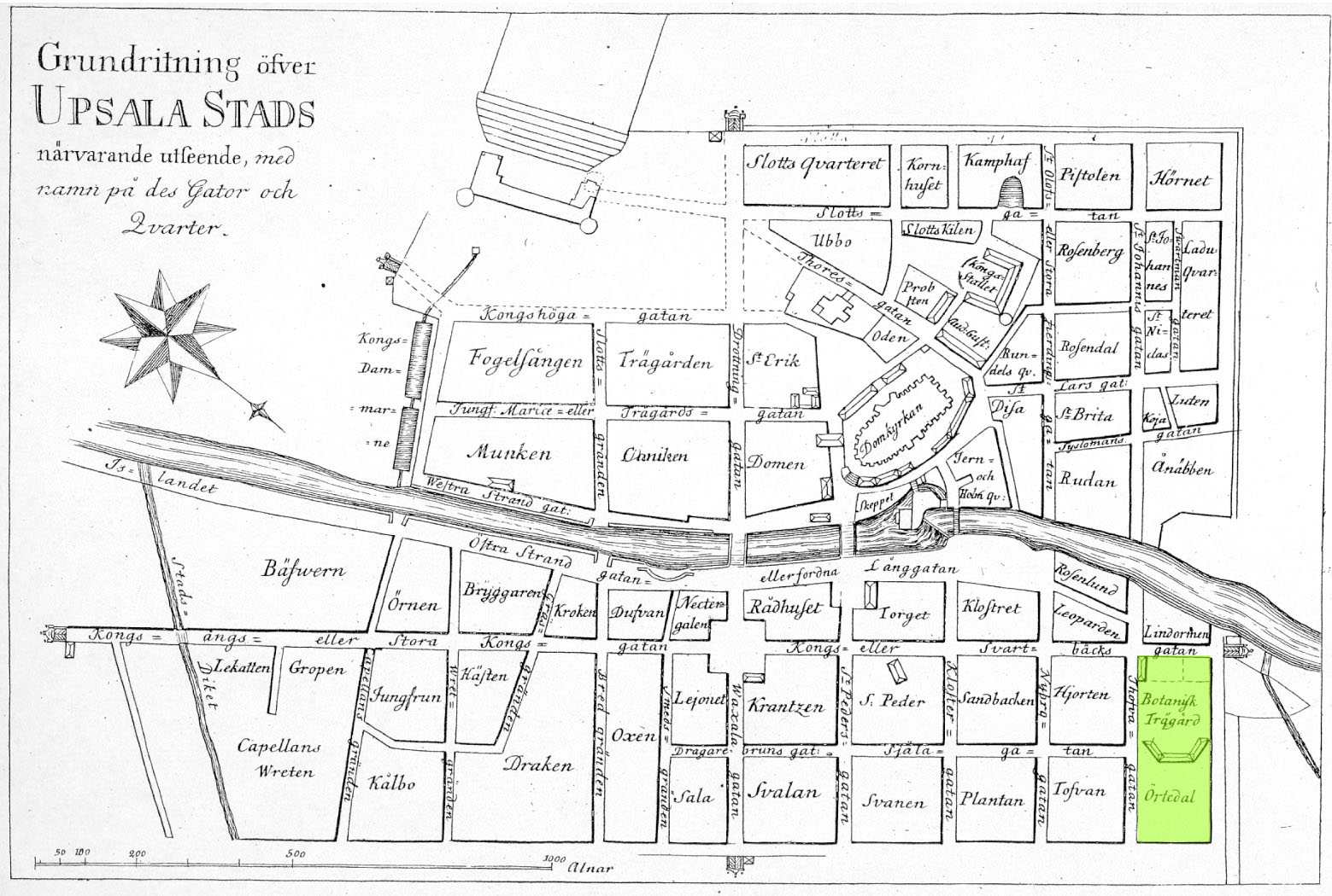 Stadtplan Uppsalas von 1770 mit hervorgehobener Lage des Linné-Gartens